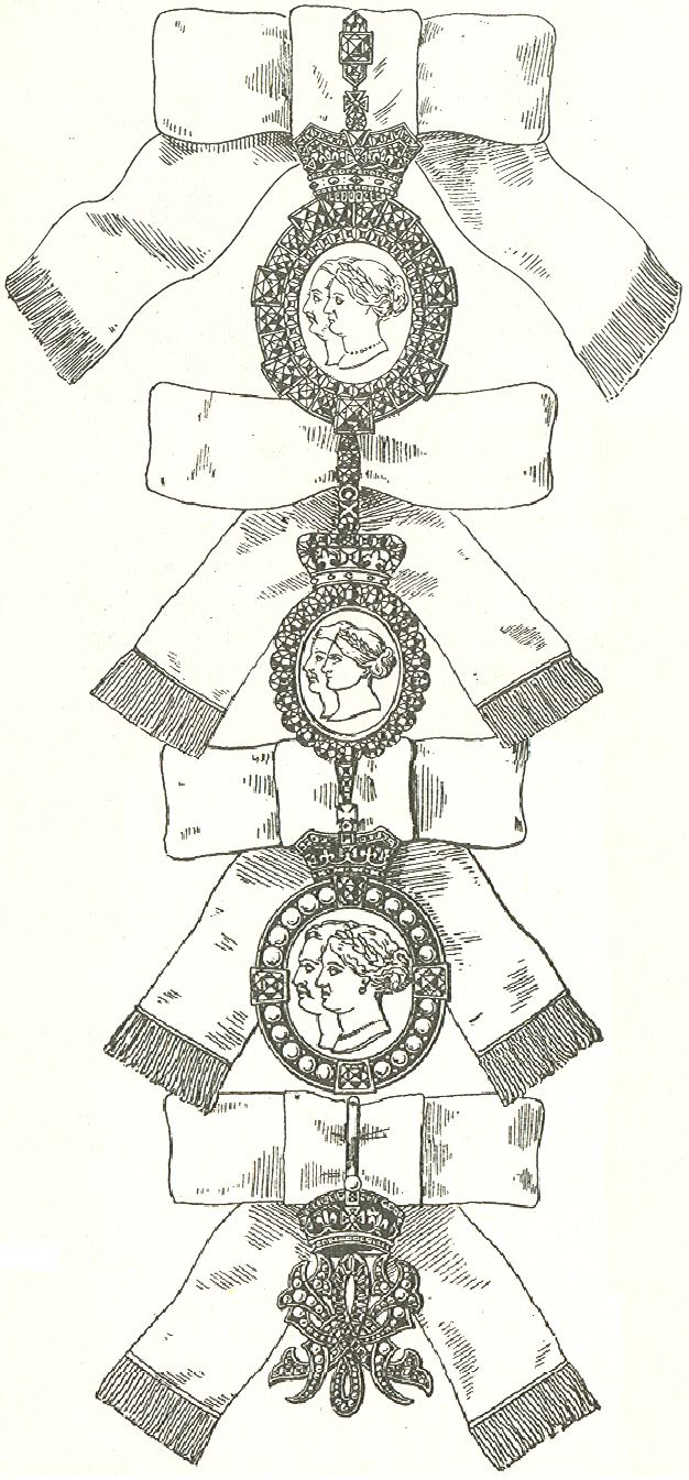 Scan van Blz. 116 en 117 van het boek "Handbuch der Ritter- und Verdienstorden " uitgegeven 1893 door Weber.Tekening van de in 1902 overleden Maximilian Gritzner. Robert Prummel 10 jul 2008 16:40 (CEST)